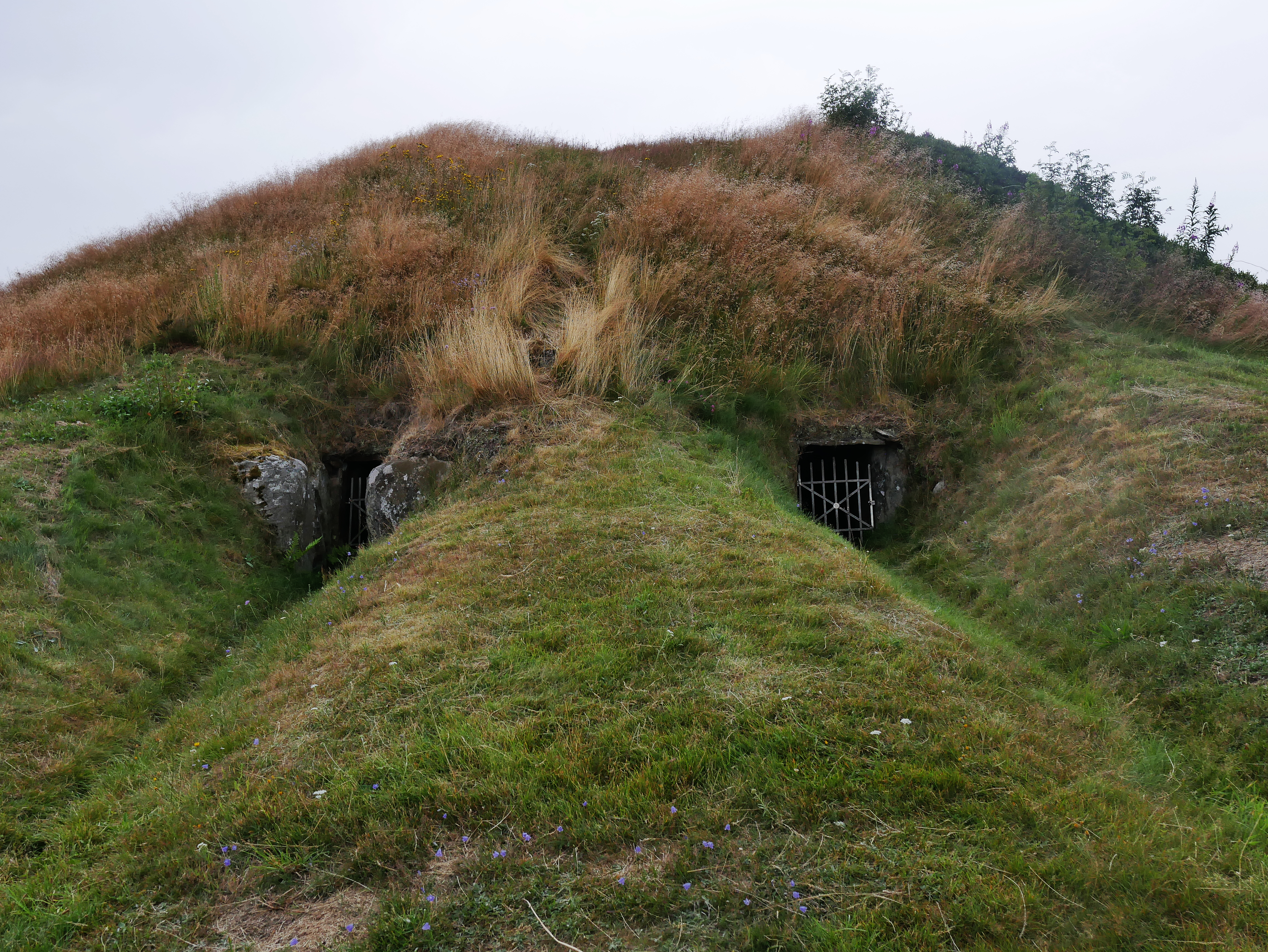 Ganggräber von Snæbum - Grabhügel Snibhøj